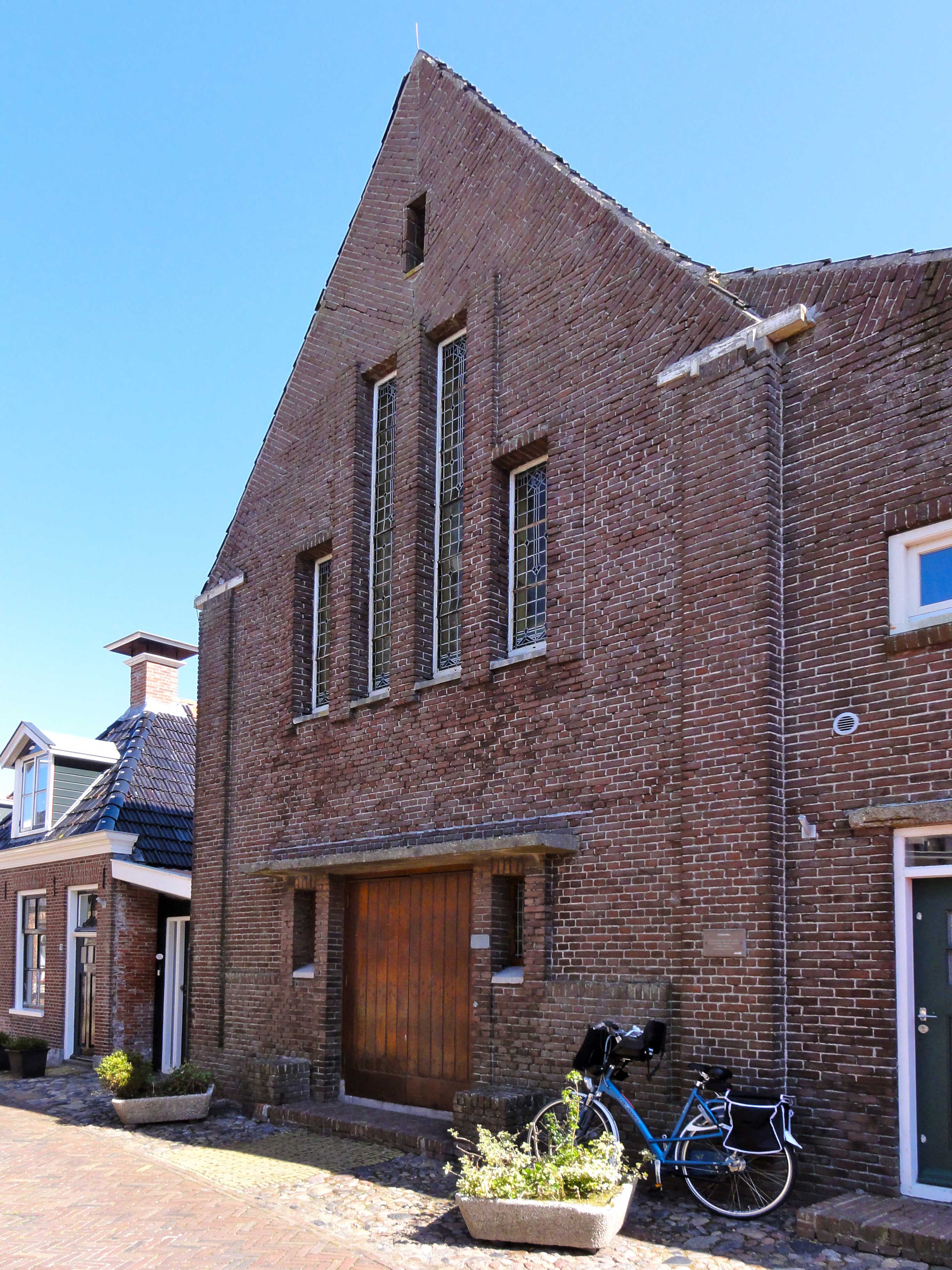 Doopsgezinde Kerk Tuinen 12 te Hindeloopen